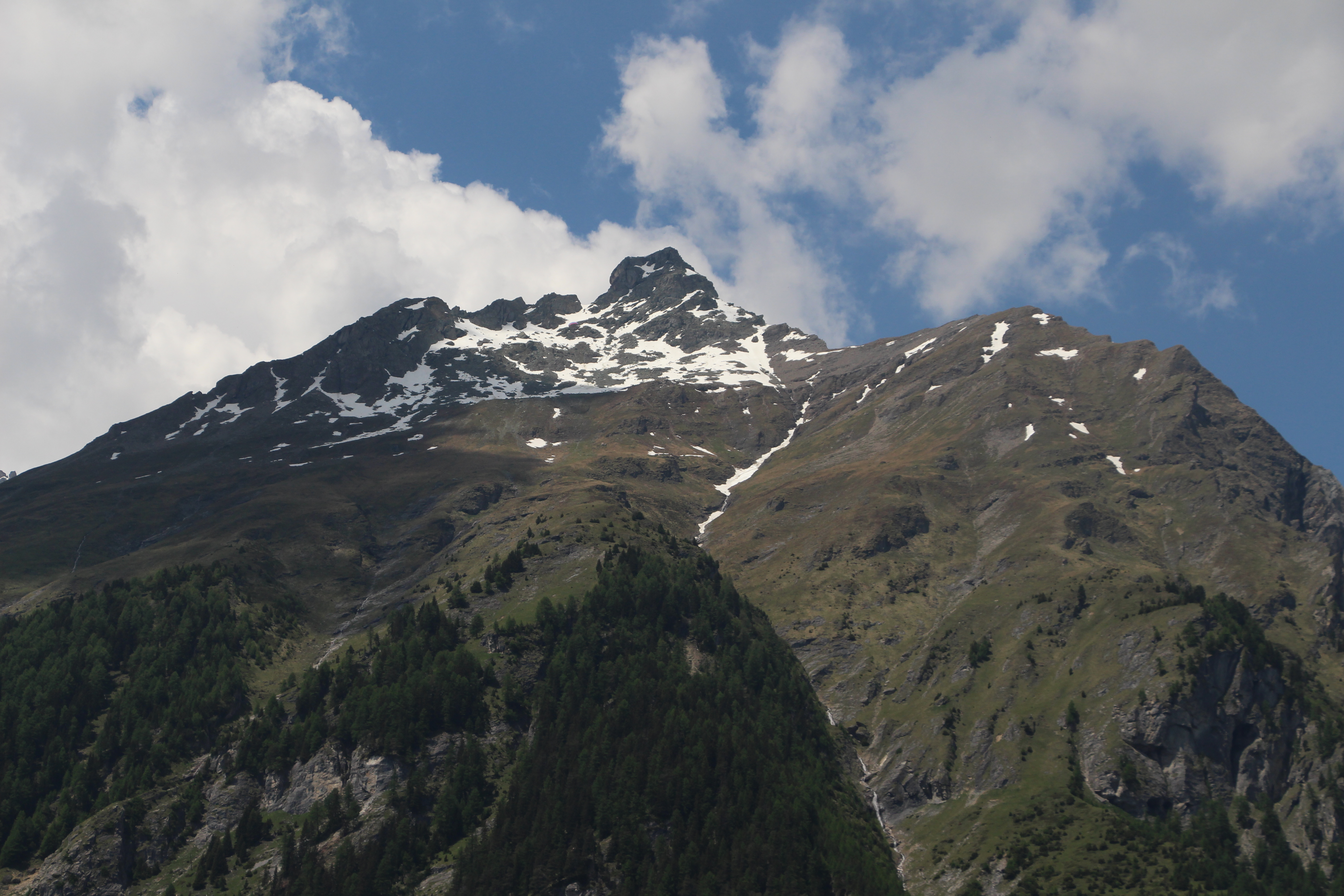 Piz Mundin von Osten (Festung Nauders) aus gesehen